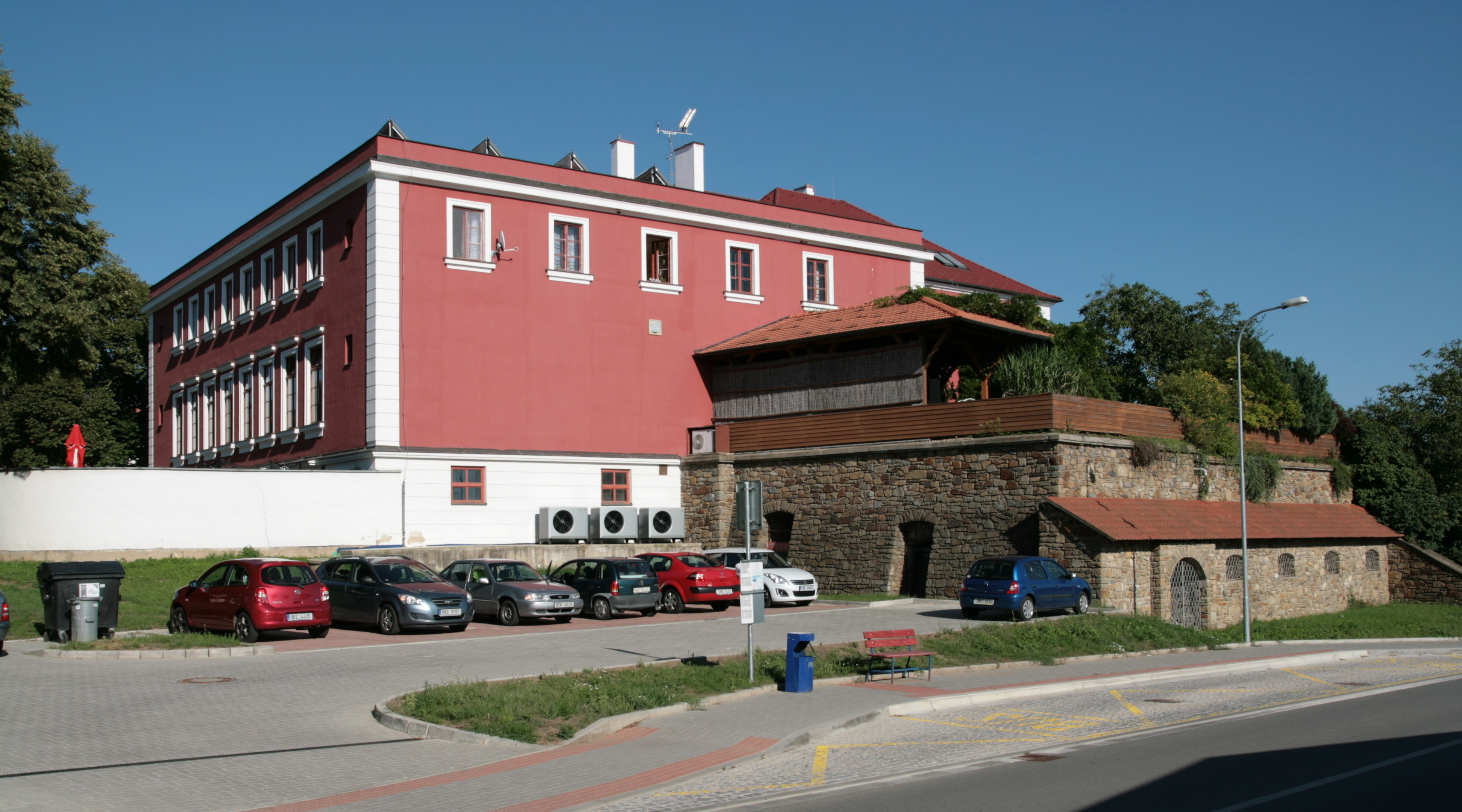 Zámek v Pozořicích, V Zámku č.p. 2, okres Brno-venkov. Pohled na zadní část od západu.